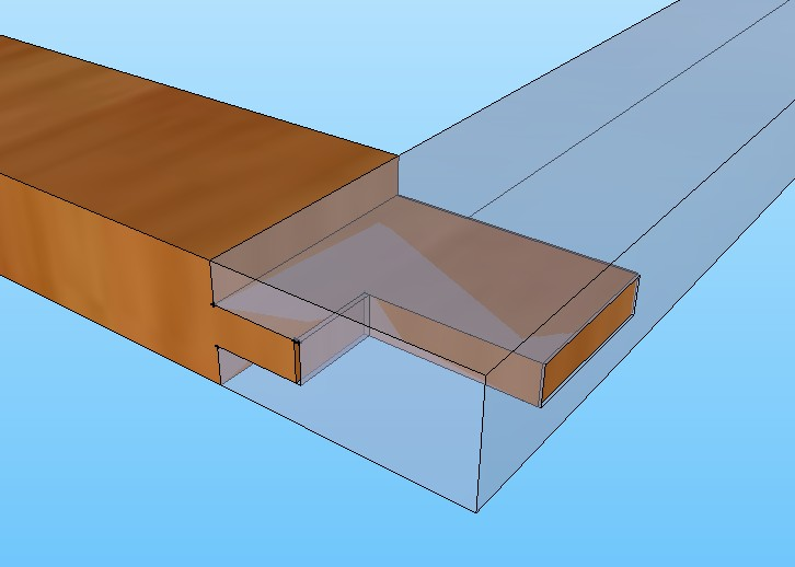 Átmenő szakállas vésett csapozás